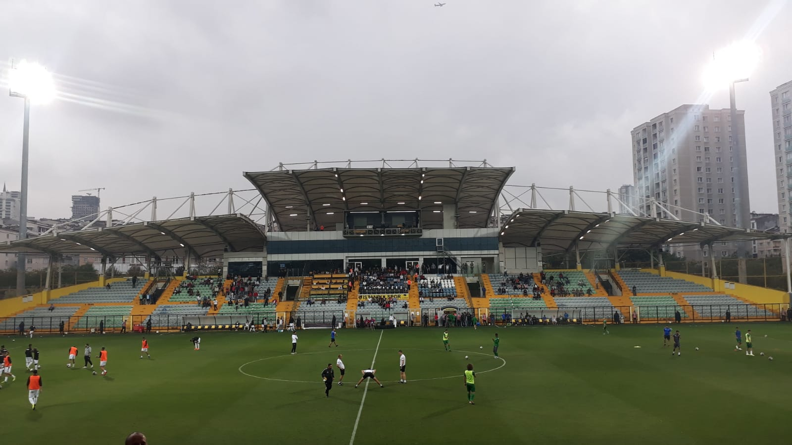 Necmi Kadıoğlu Stadyumu, Esenyurt, İstanbul